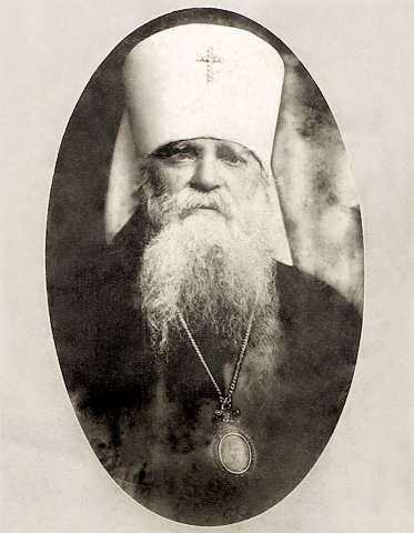 митрополит Елевферий (Богоявленский)